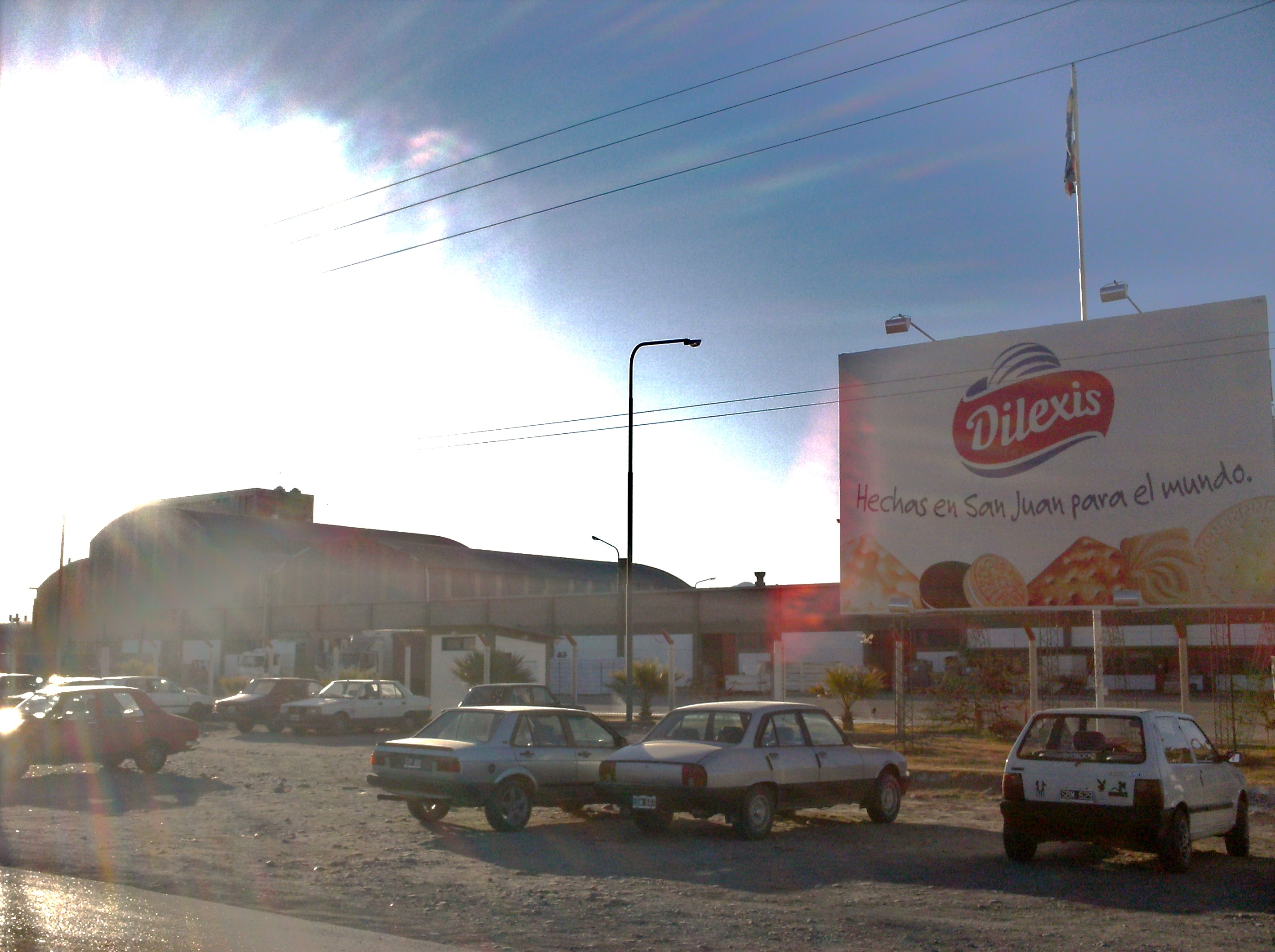 fabrica de galleta